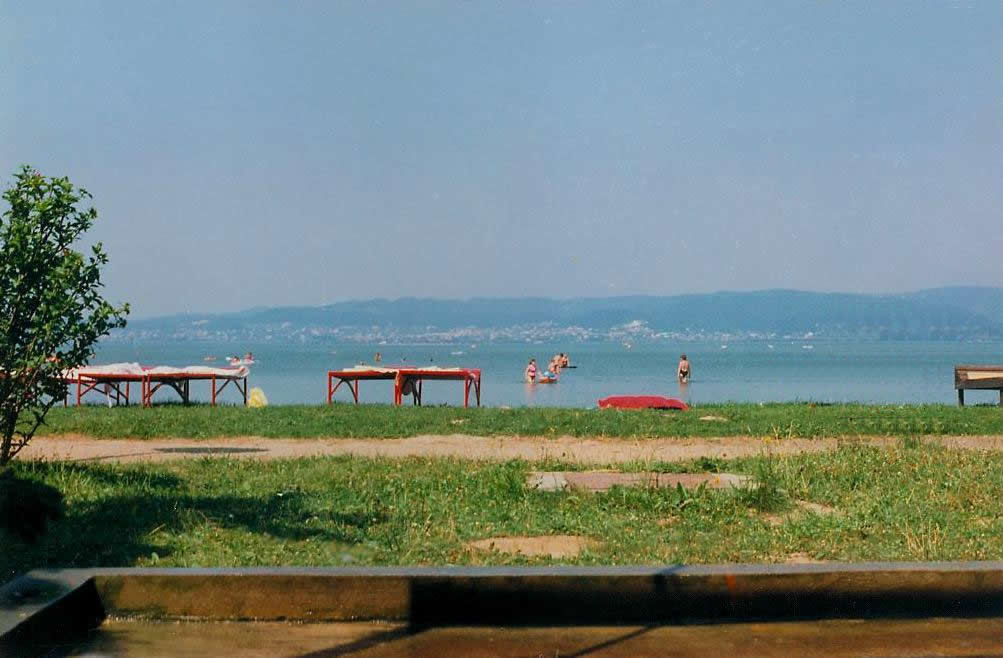 am Balaton